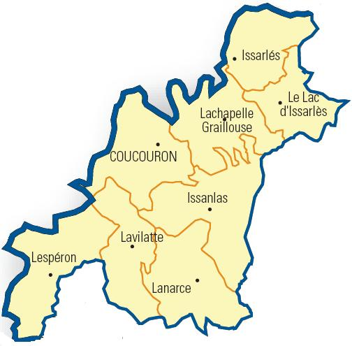 Carte détaillée des communes du canton (Ardèche)